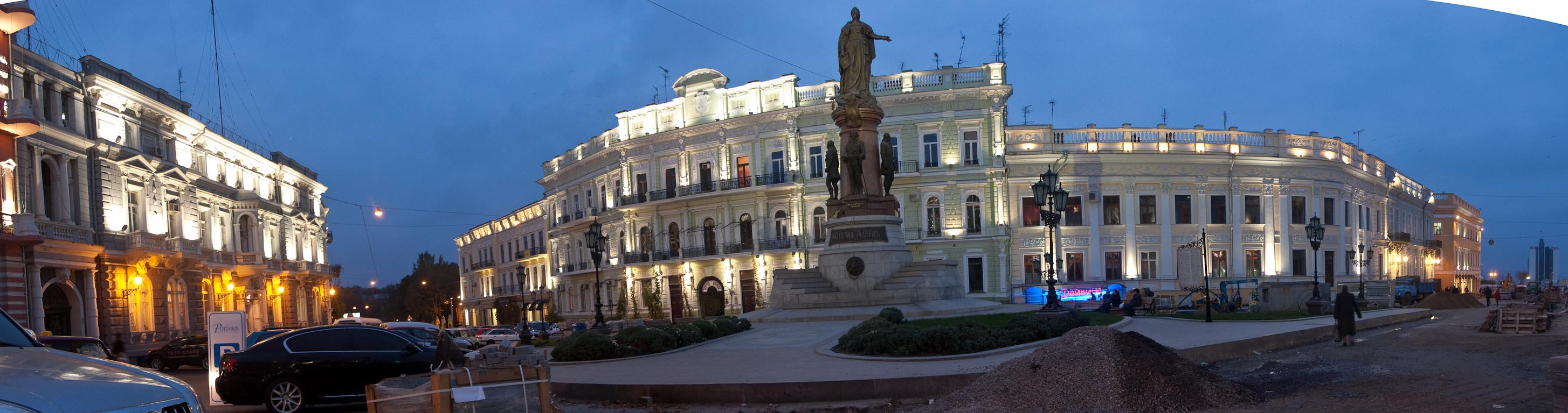 Украина (Україна): обл.Одесская (обл.Одеська): Одесса (Одеса): р-н Приморский: пл.Екатерининская; 16:43 05.11.2008